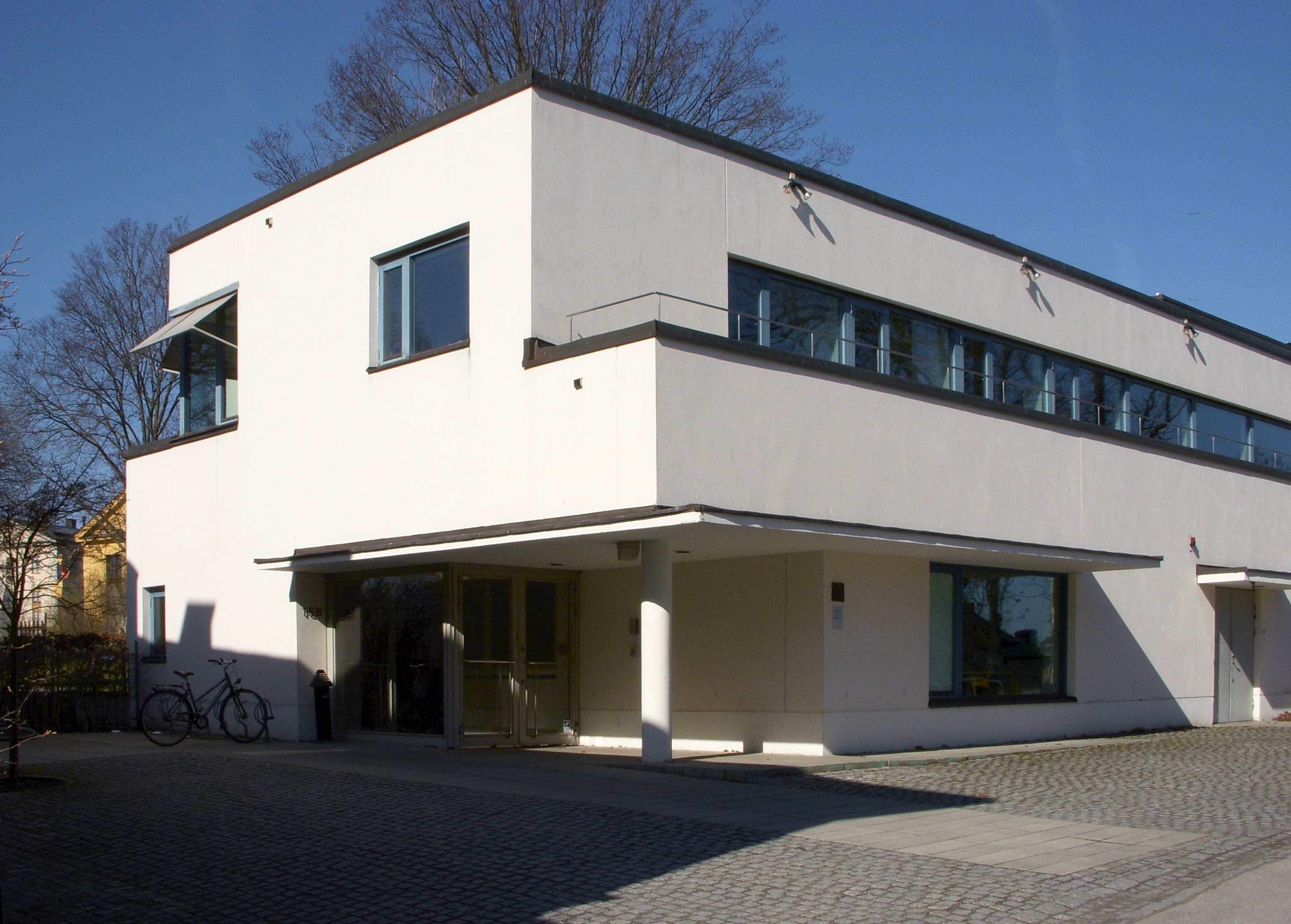 Arkitekturmuseet på Skeppsholmen (administrationsbyggnad)